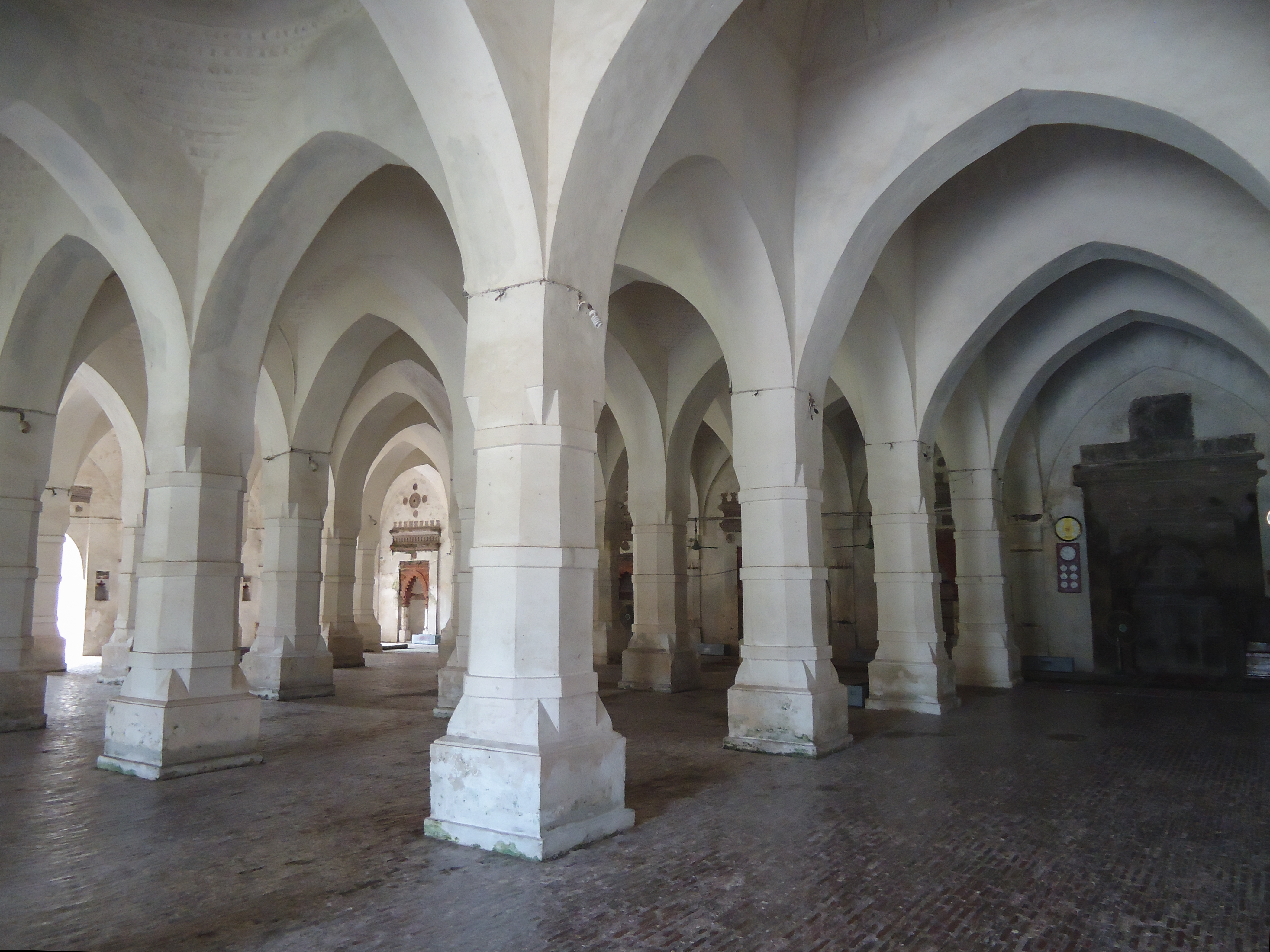 ষাট গম্বুজ মসজিদ